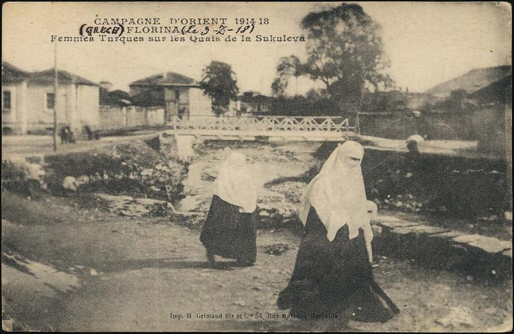 Картичка от Лерин с изобразени туркини на брега на река Сакулева.